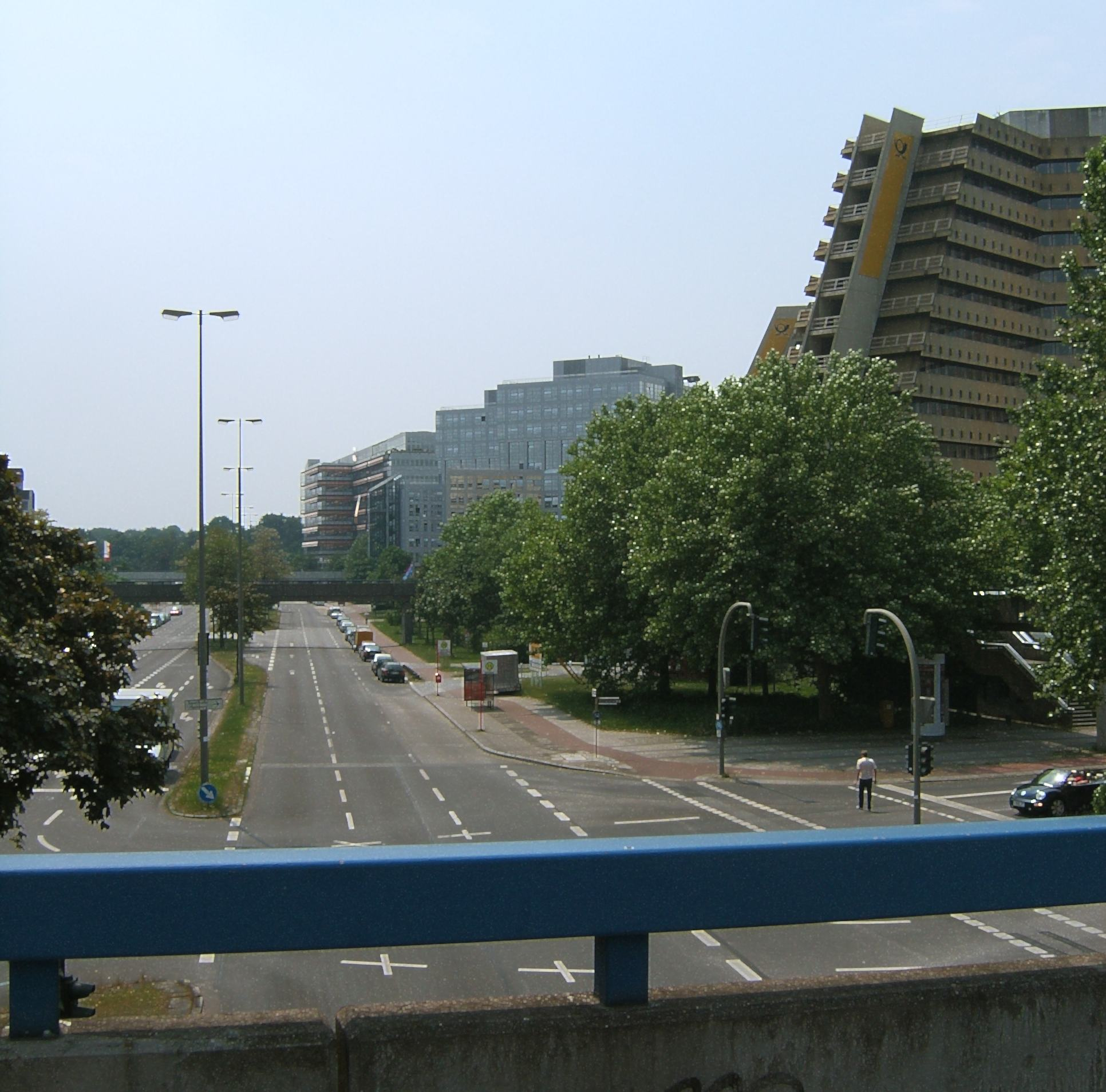 Bildbeschreibung: Hamburg, City-Nord, Überseering. Rechts vorne die ehemalige Oberpostdirektion. Fotograf: selbst Datum: 14.6.2006